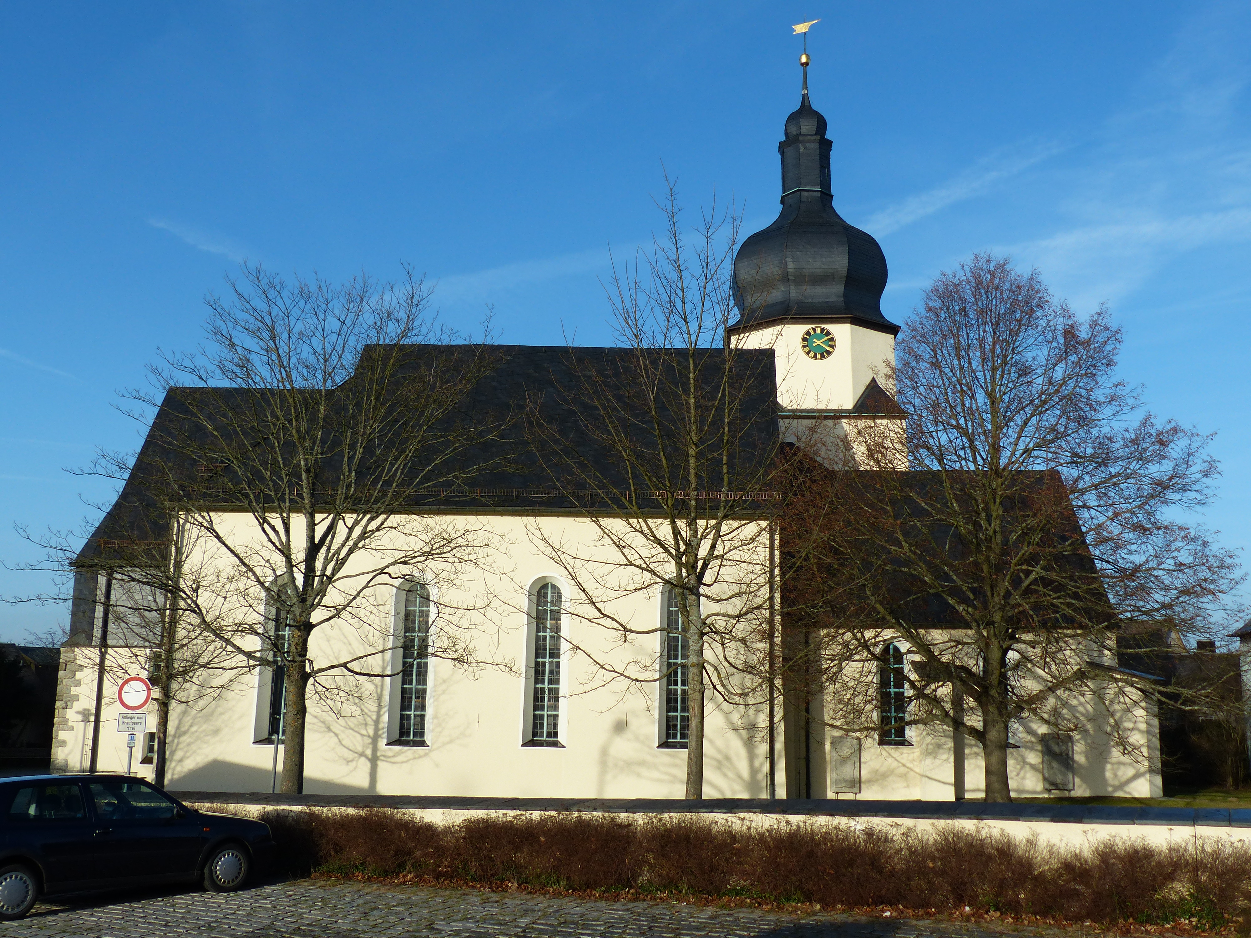 Berg, Landkreis Hof